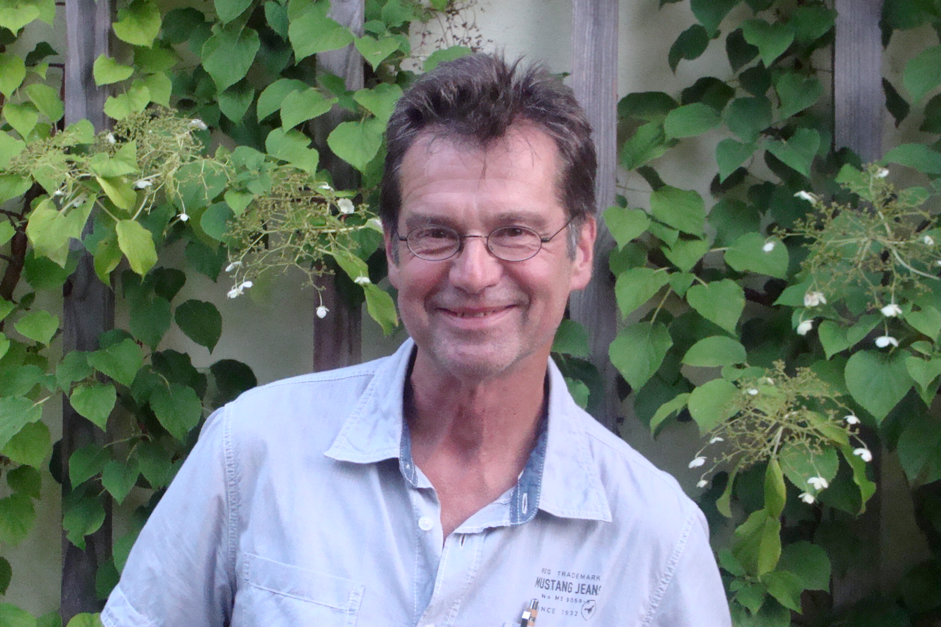 Foto des Autors Lutz Dettmann